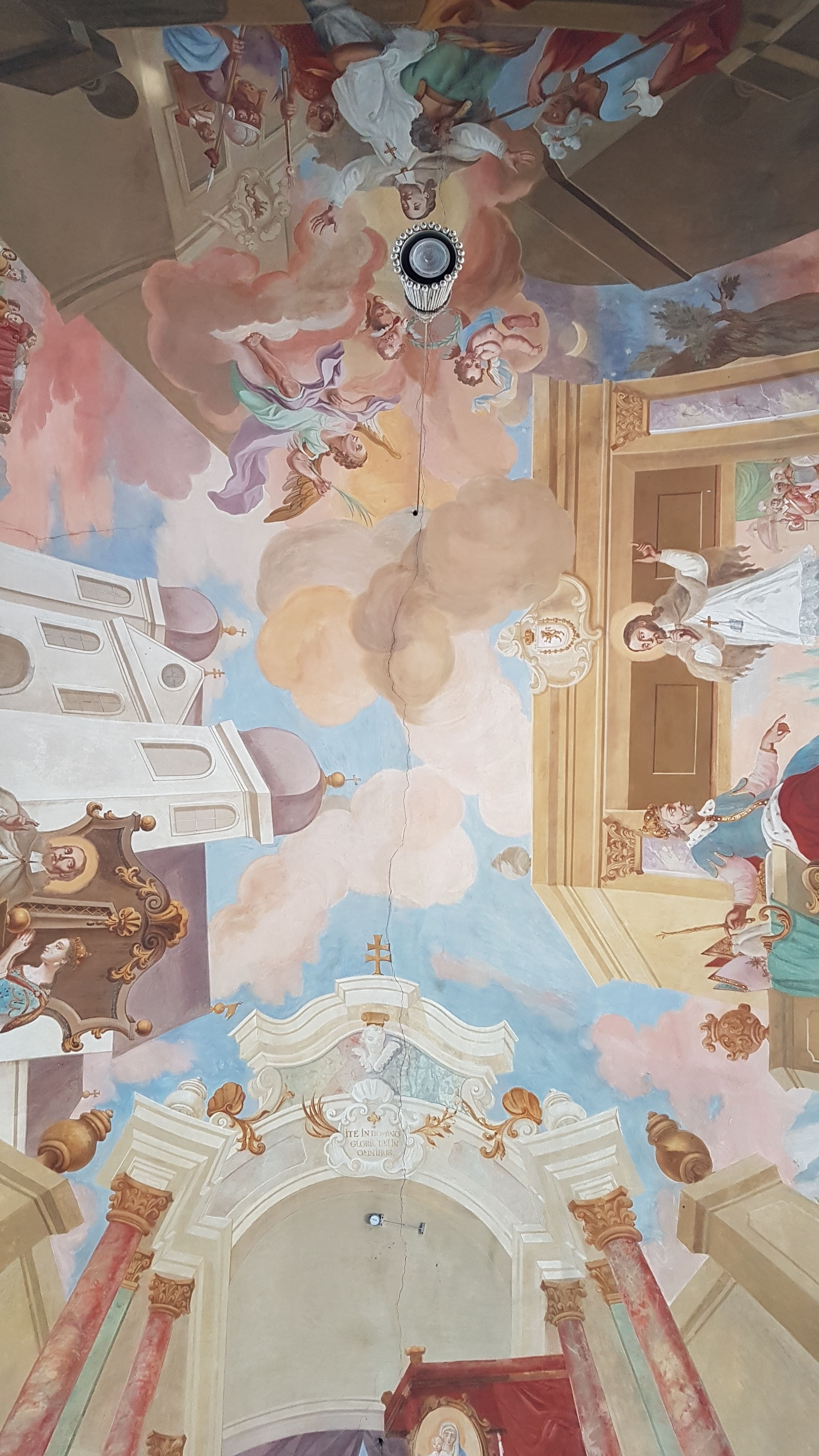 Maria Stern (Neukirchen am Simssee)